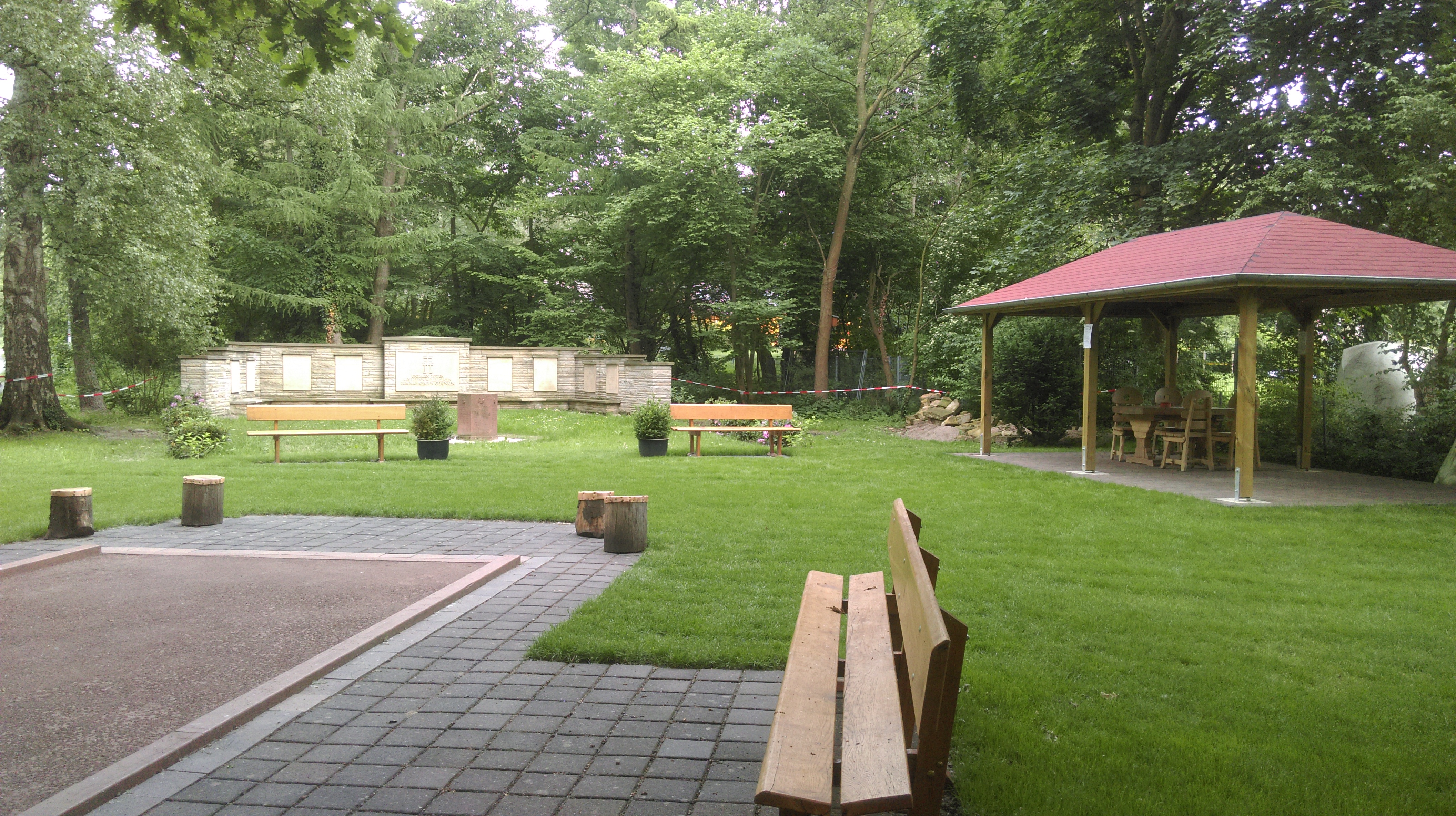 Der vom Bürgertreff Waddenhausen neu geschaffene Dorfplatz mit der Boulebahn